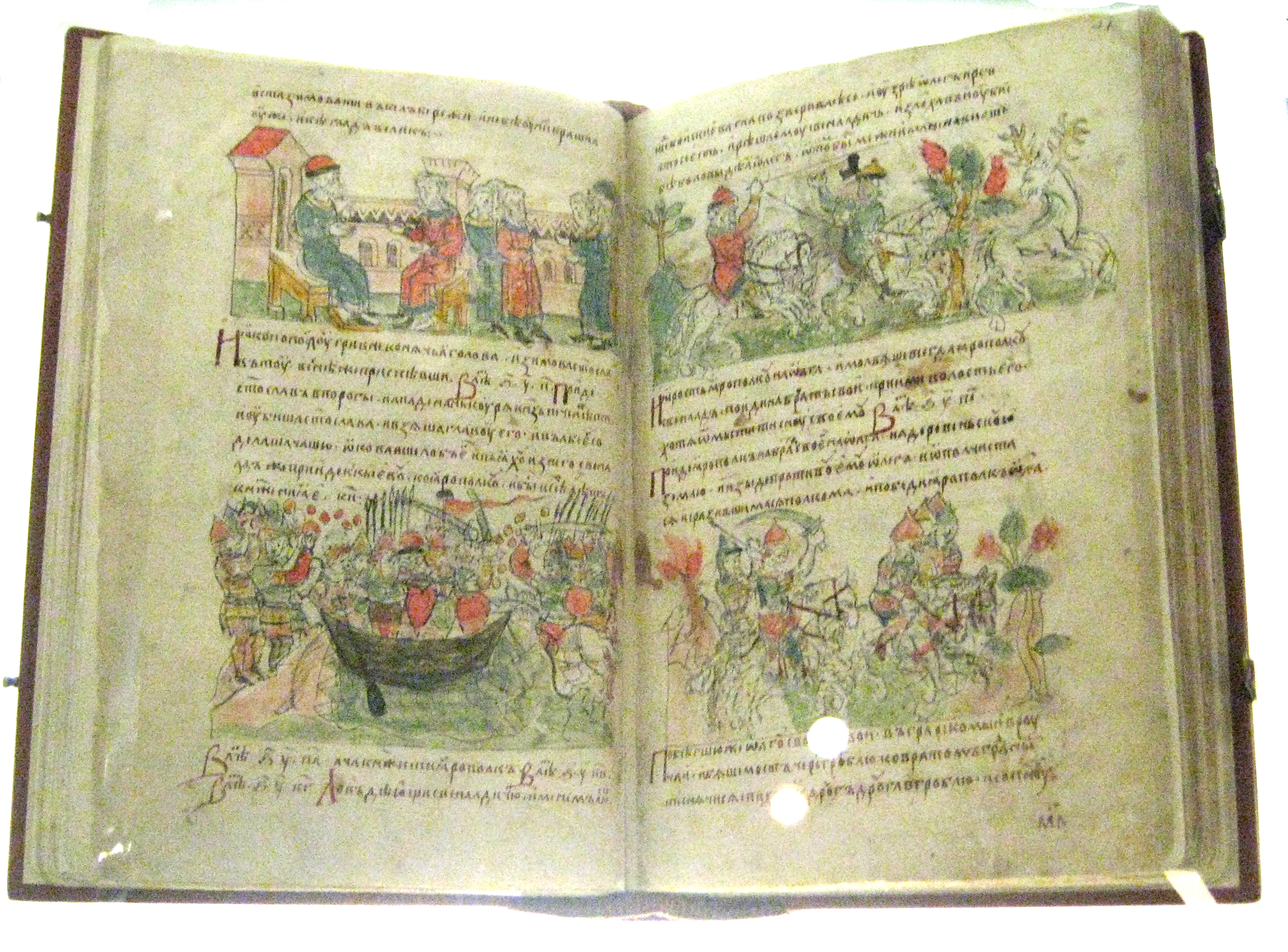 Список экспонатов РАДЗИВИЛОВСКАЯ ЛЕТОПИСЬ Конец XV века 251 л. Бумага, чернила, киноварь, темпера 31,5 х 21 Поступила в 1761 году С середины XVII века собственность князей Радзивиллов. Богуславом Радзивиллом была завещана Кенигсбергской библиотеке, куда поступила в 1671 году. В 1758 году по специальному ходатайству Императорской академии наук и за подписью императрицы Елизаветы Петровны летопись была прислана из Кенигсберга в Санкт-Петербург БРАН инв. ОС 34.5.30